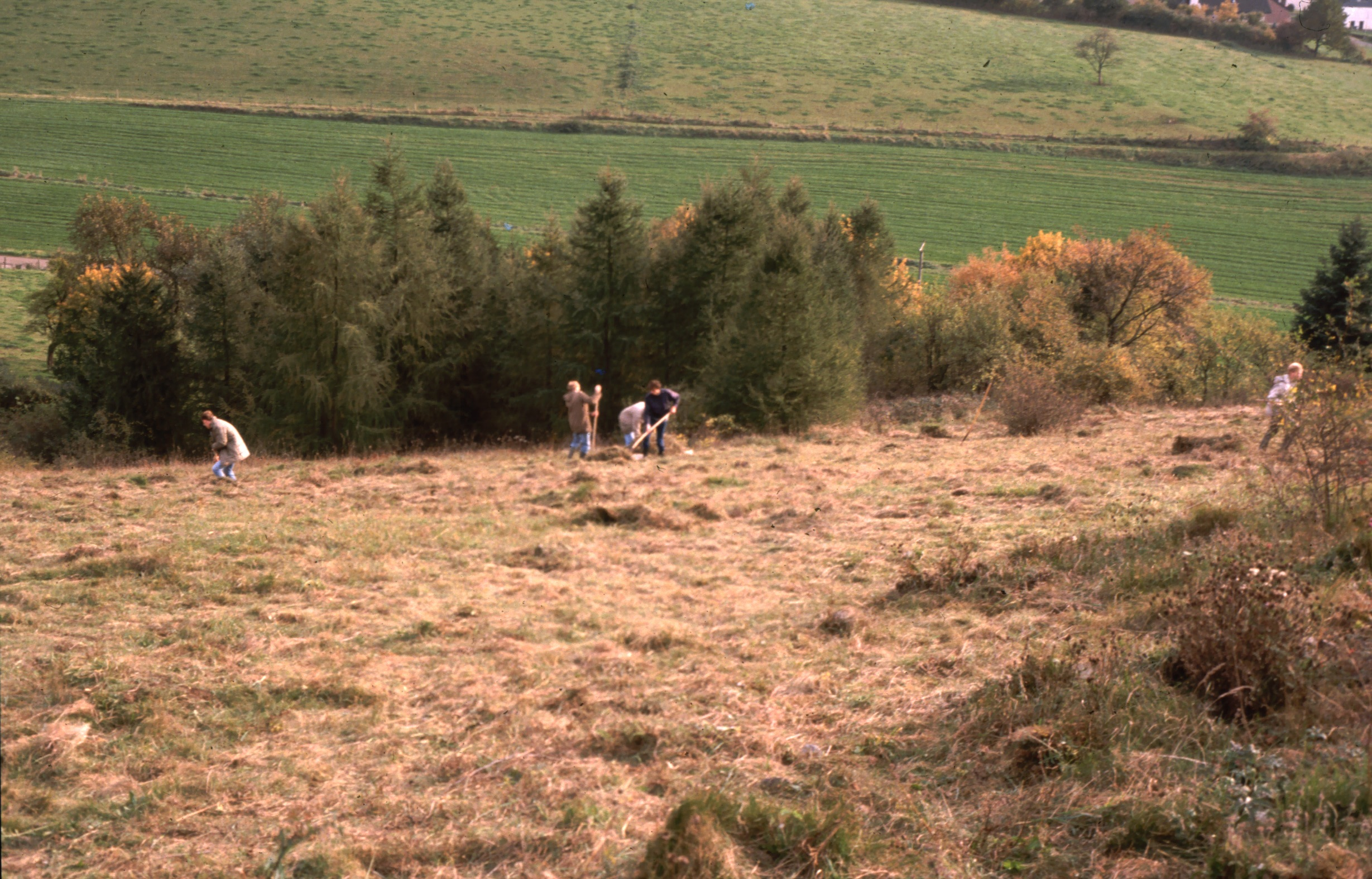 Mitglieder des Verein für Natur- und Vogelschutz bei einem Arbeitseinsatz 1984 im Naturschutzgebiet Steinert (Kalkmagerrasen) bei Sundern-Allendorf im Hochsauerland.